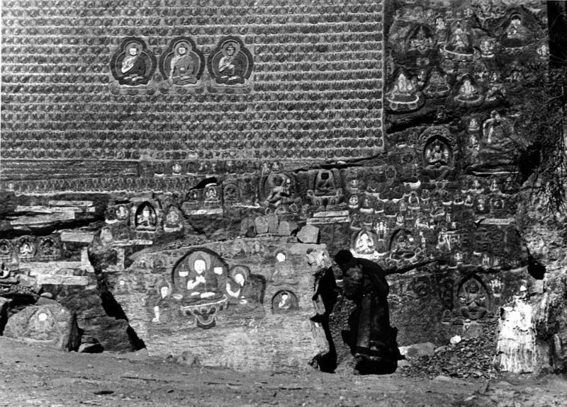 Lhasa, der heilige Medizinfelsen mit Skulpturen, Gebetsmühlen, Felsmalereien etc.